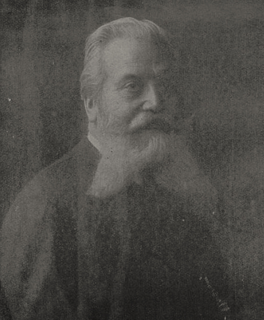 Richard Brend’amour, Seniorchef der bekannten Kunstanstalt, beging am 16. Oktober seinen 80. Geburtstag, Foto Otto Renard, 1911